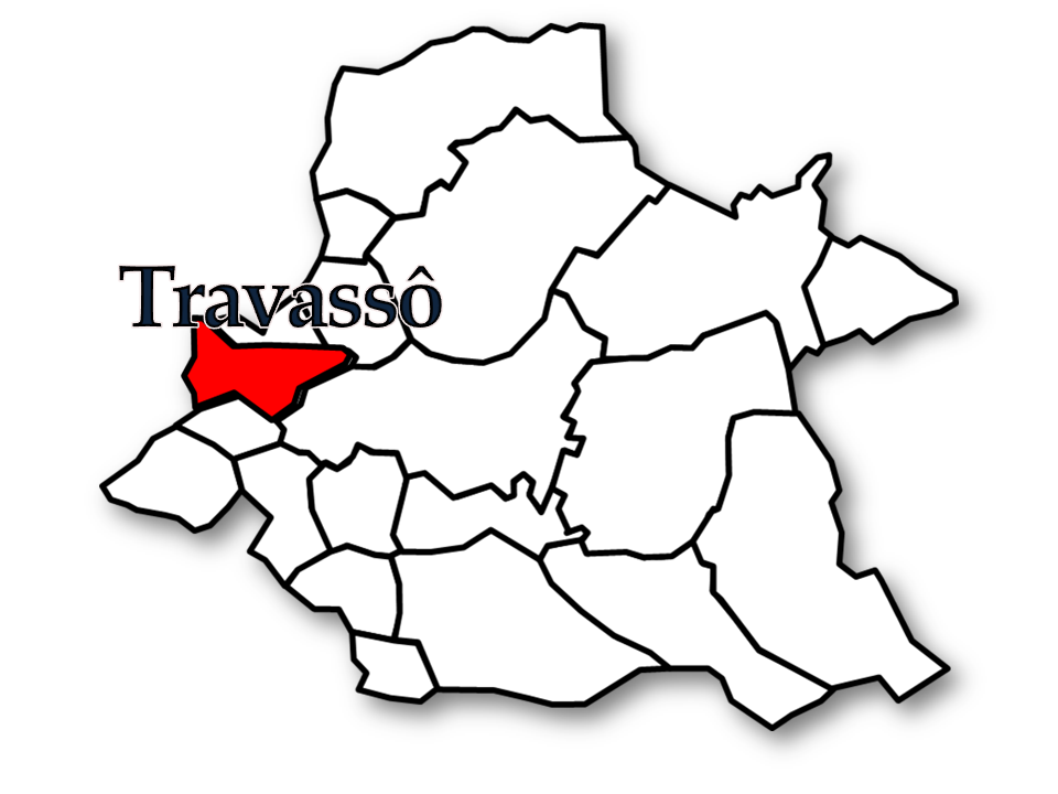 Censos 1864/2011